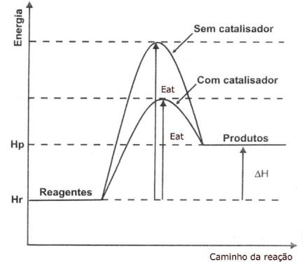 Diagrama de energia